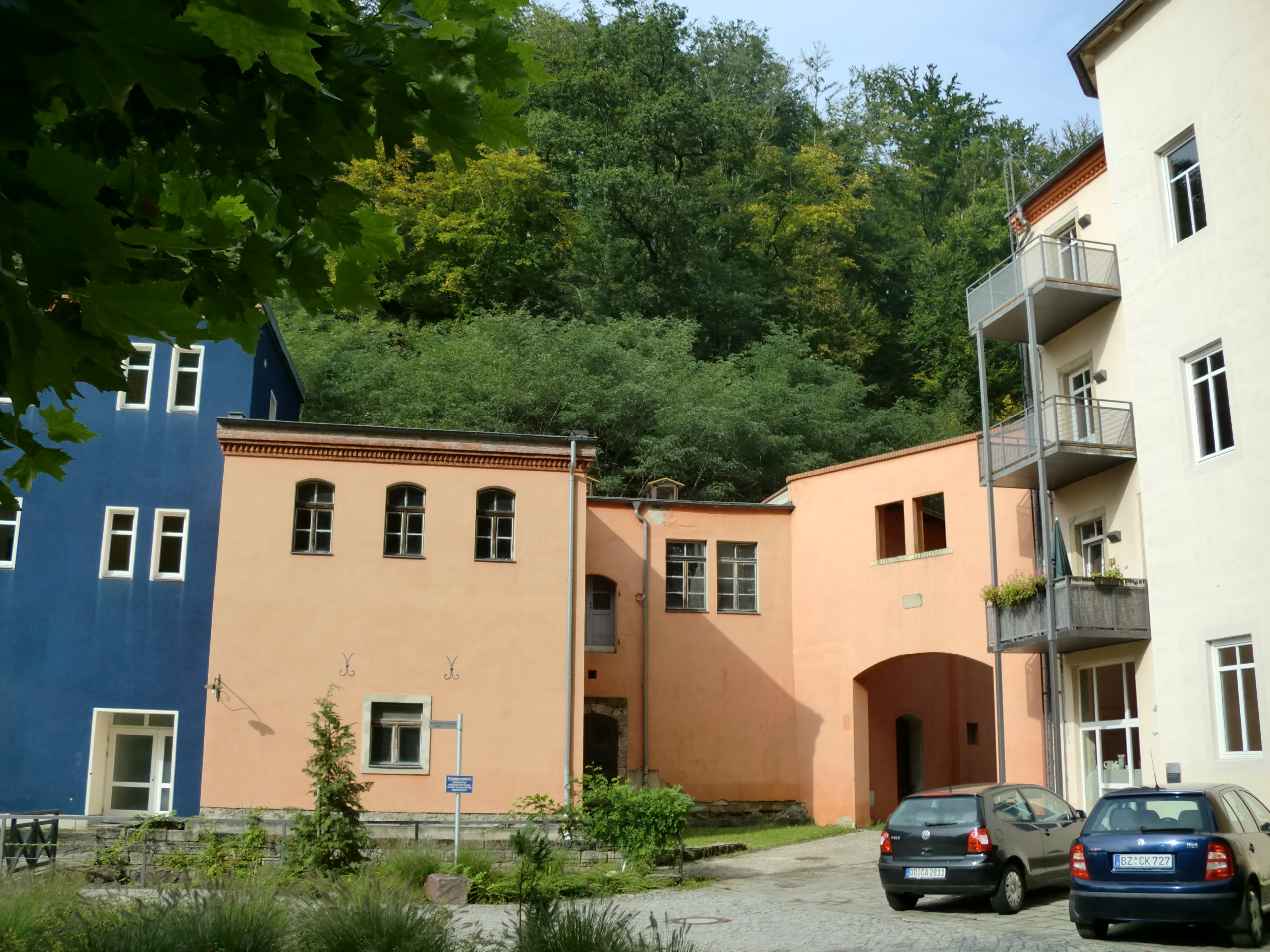 Ehemalige Pharmazeutischen Fabrik Helfenberg am Helfenberger Bach